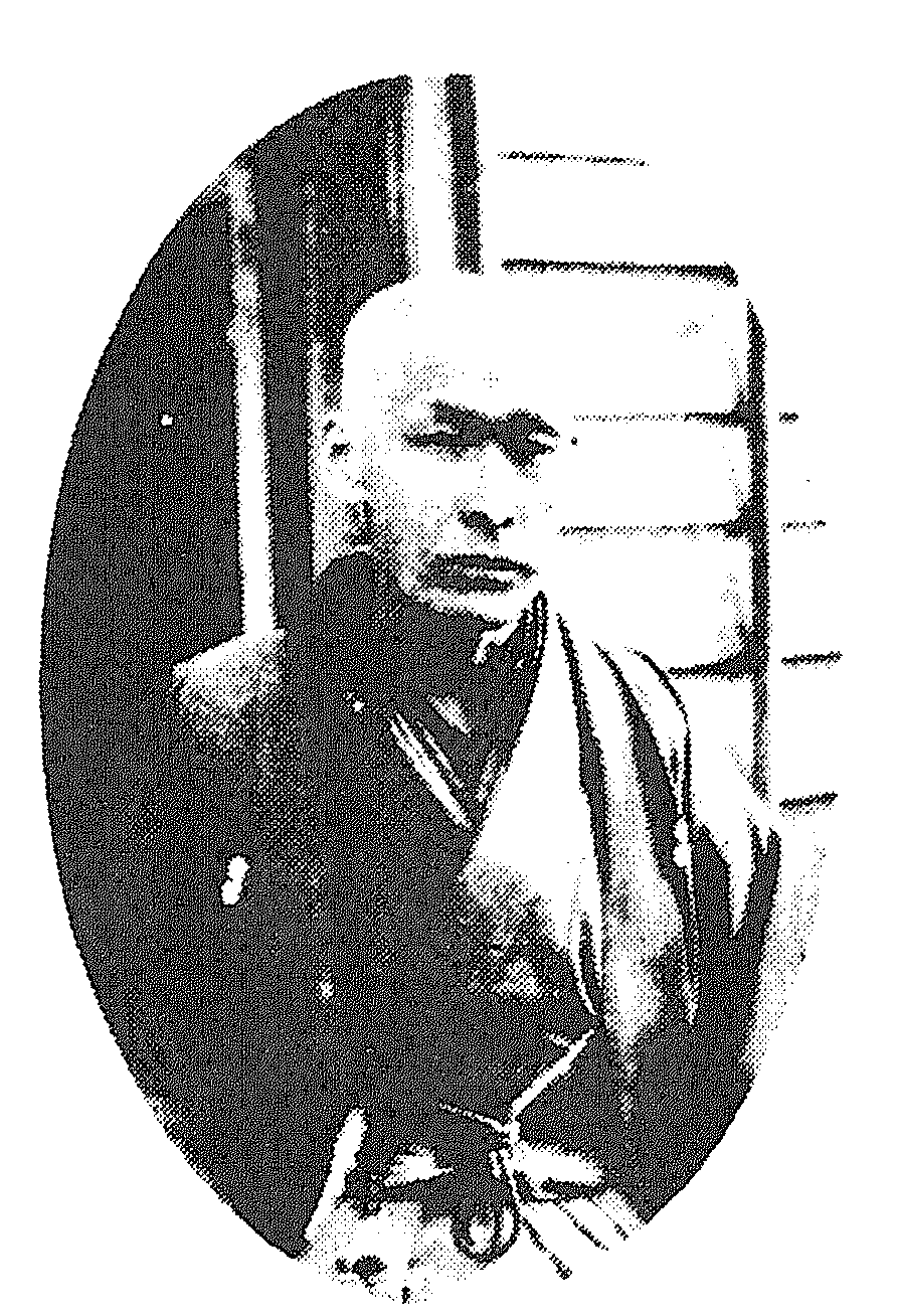 晩年の前田元敏（東京・郁文館夢学園蔵）